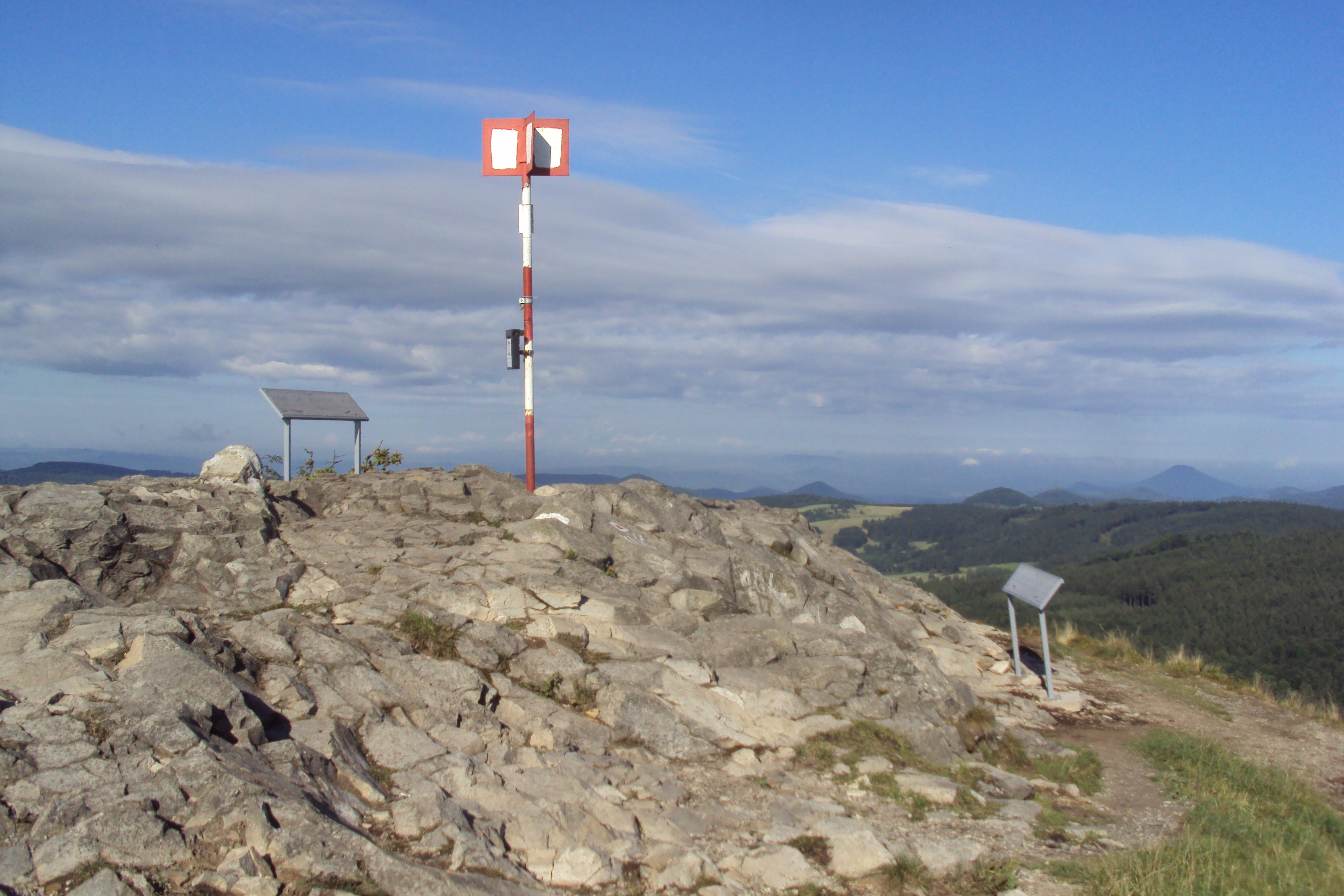 Vrcholová skála na hoře Klíč